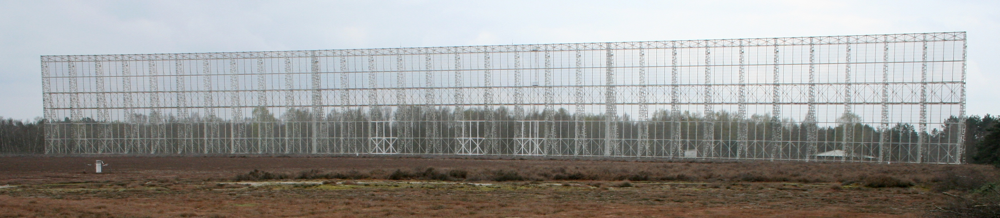 Miroi sphérique du Grand Radiotélescope de Nançay